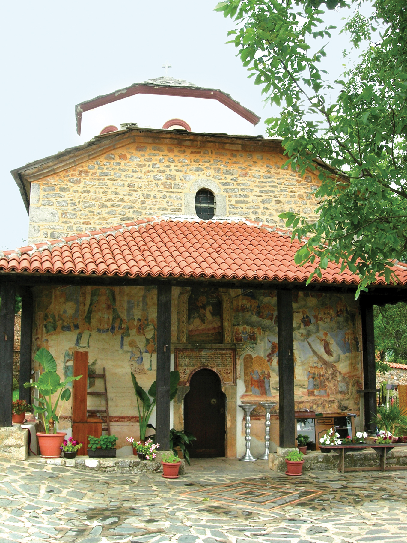 Манастирот „Свети Ѓорѓи Победоносец“ во село Рајчица, Македониjа